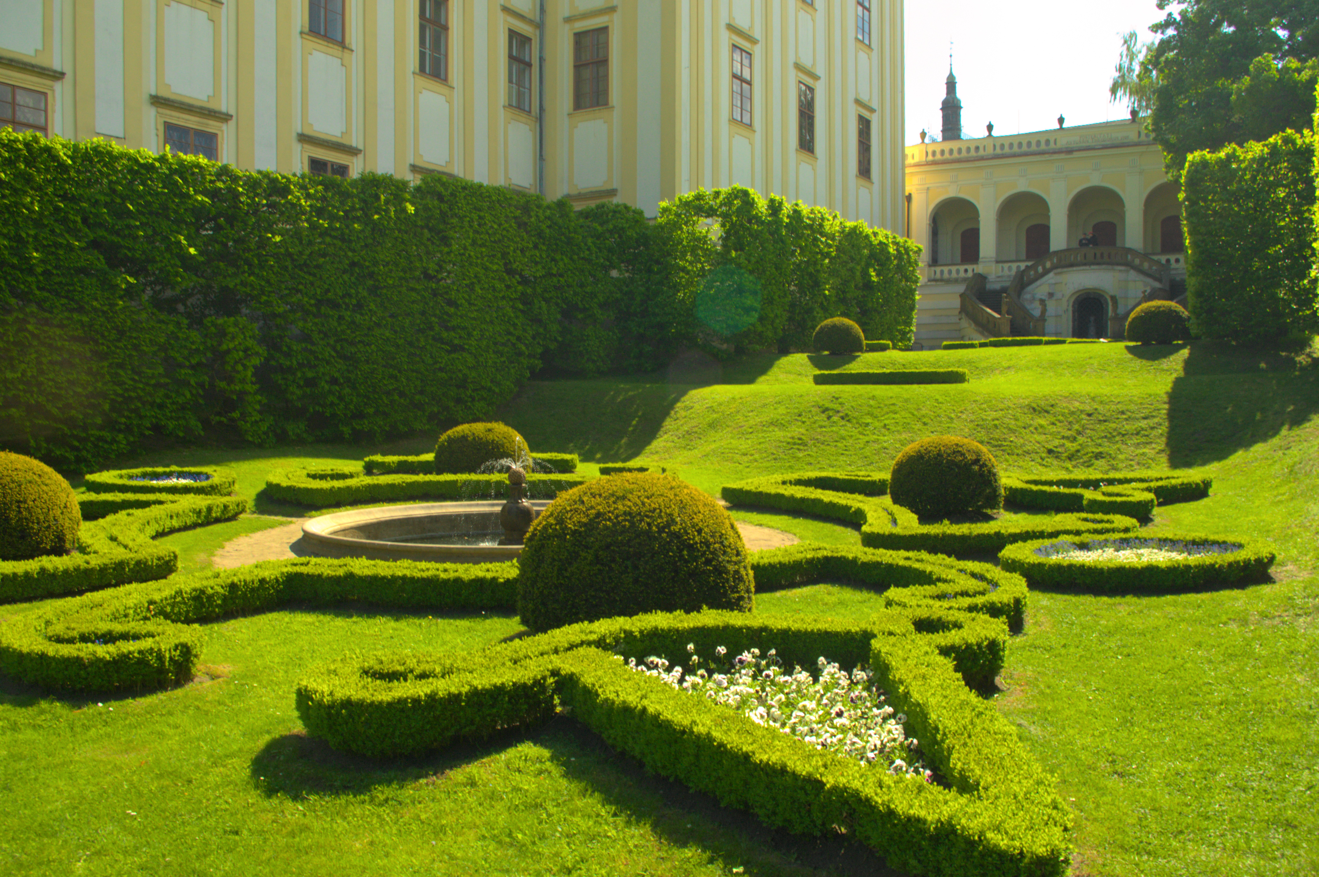 Zámek Kroměříž, nám. Sněmovní, též ZSJ Podzámecká zahrada 1/2, Kroměříž, Kroměříž.